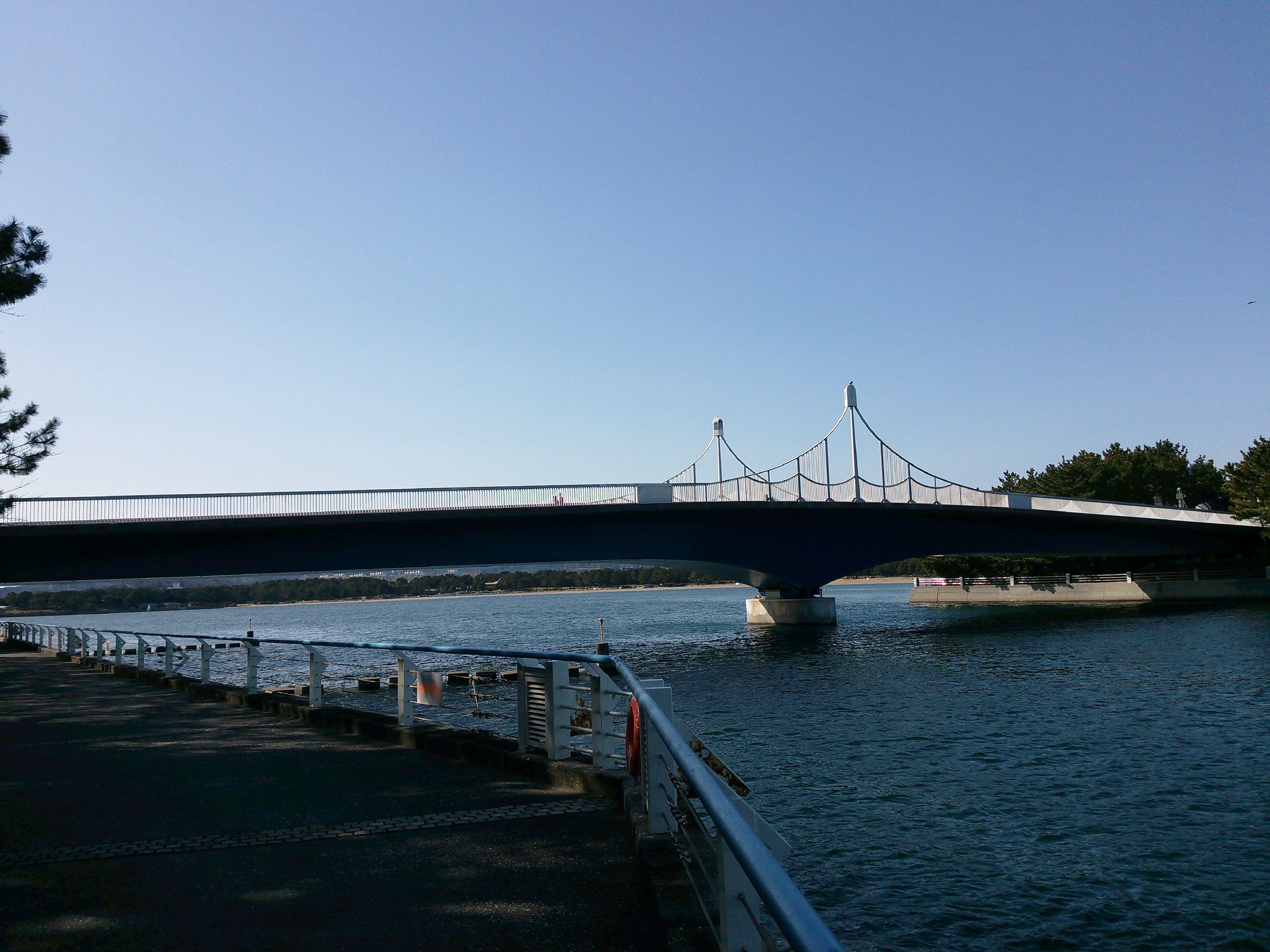 横浜市金沢区。八景島駅と八景島を結ぶ、金沢八景大橋。東側、八景島より